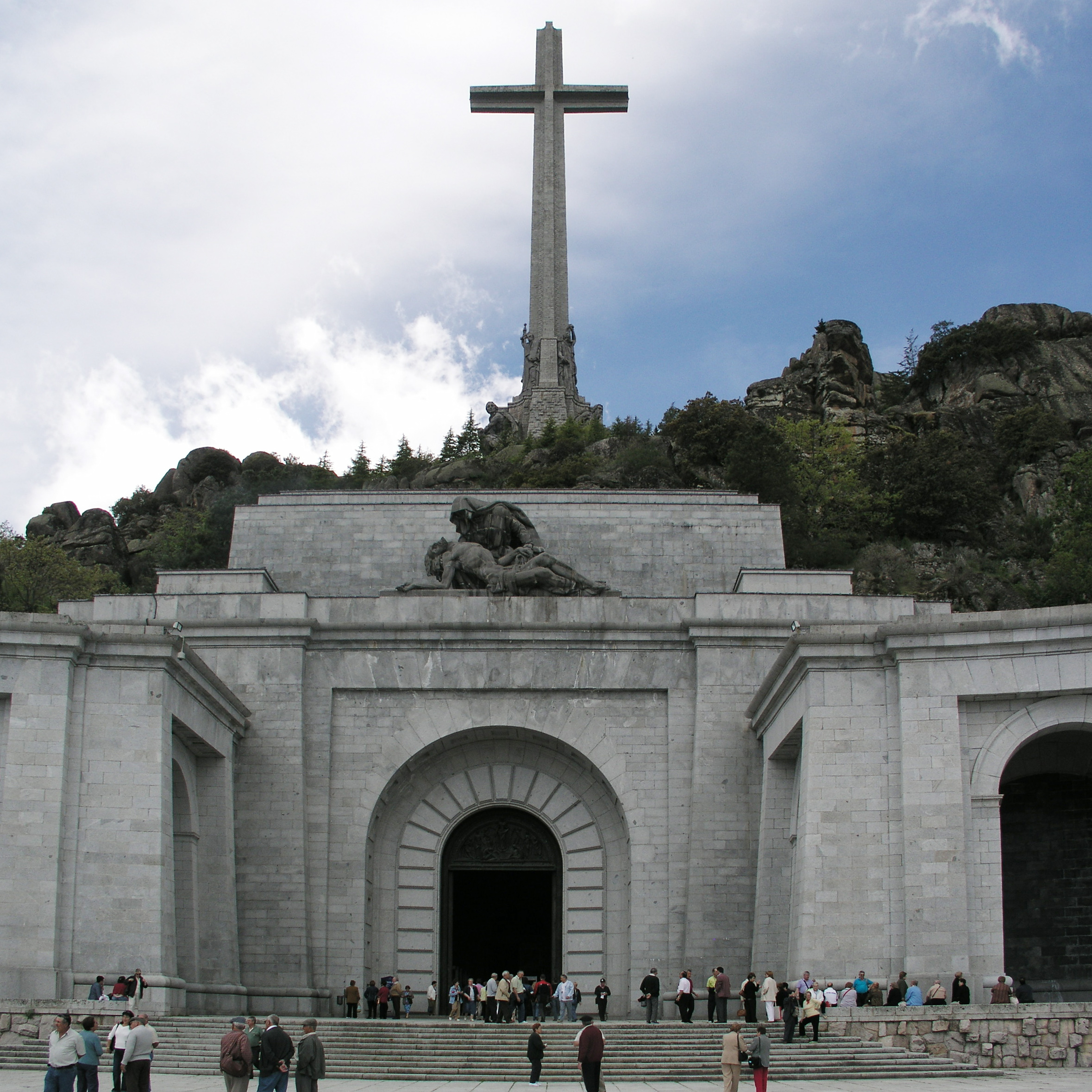 Valle de Los Caidos, Madrid, Spain. Cross.